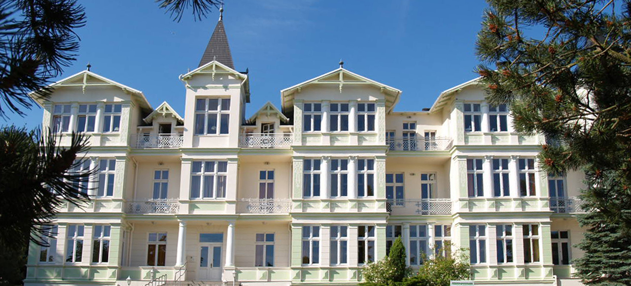 Baudenkmal Dünenstraße 27